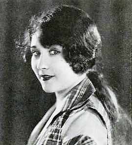 Ann Christy